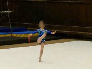 Juvanile gymnast